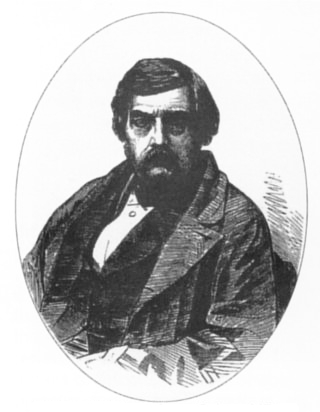 Colonel W H Sykes